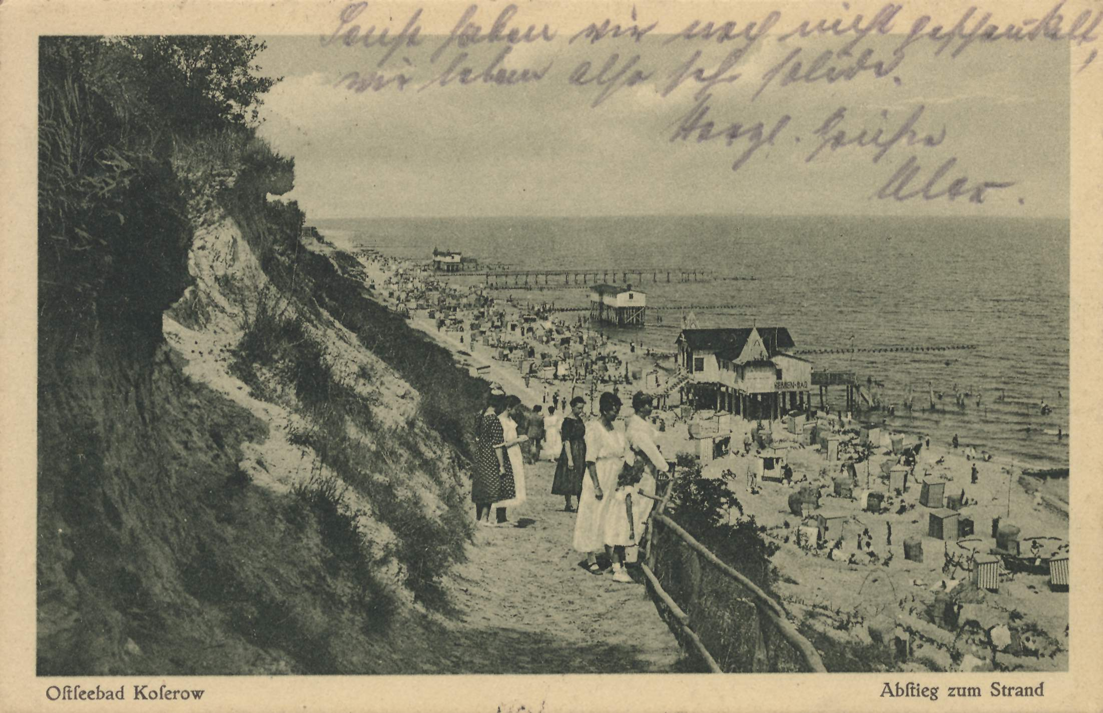 Ostseebad Koserow - Abstieg zum Strand